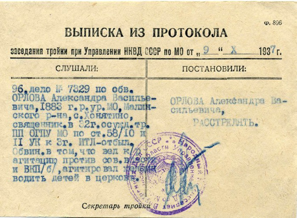 фото подделка, под делом 7329 другой человек Резниченко Ивана Ивановича (1913 г.р.)